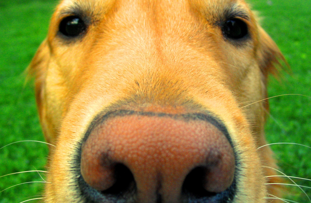 Фотография носа собаки